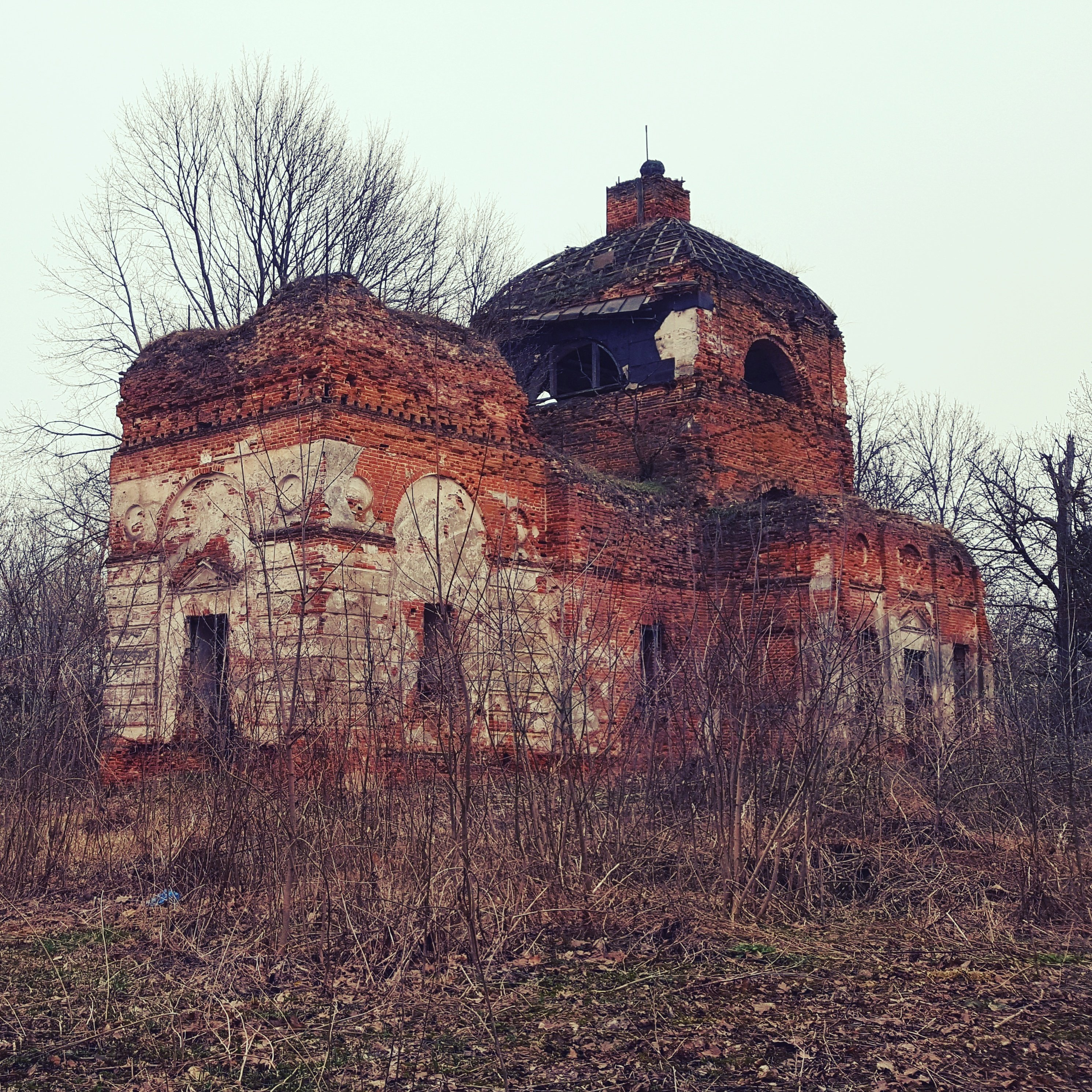 Разрушенная церковь в селе Великий Бор Гордеевского района